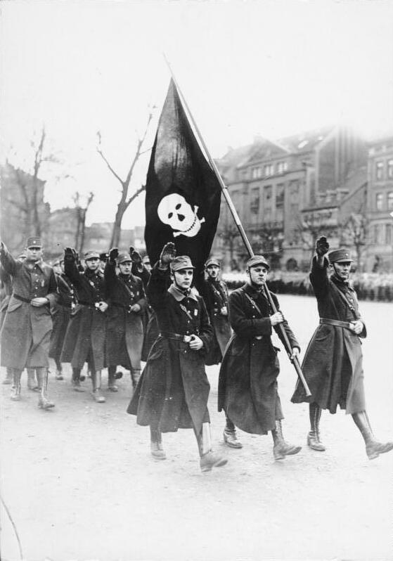 Zu dem Verbot der S.A. der "Privat Armee" Adolf Hitlers! [Herausgabe des Fotos April 1932] Die Totenkopf-Brigade der S.A. während eines Aufmarsches in Braunschweig